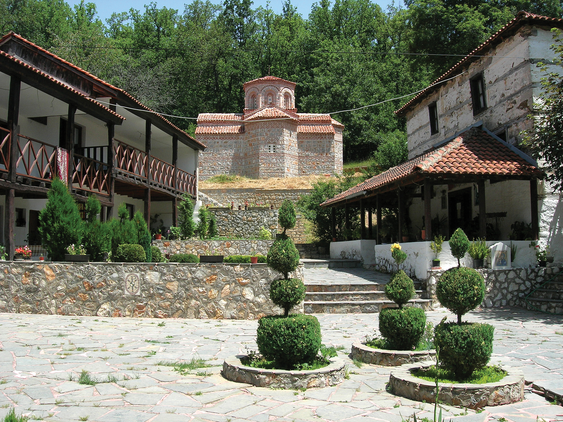 Манастирът „Успение на Пресвета Богородица“, Янковец.